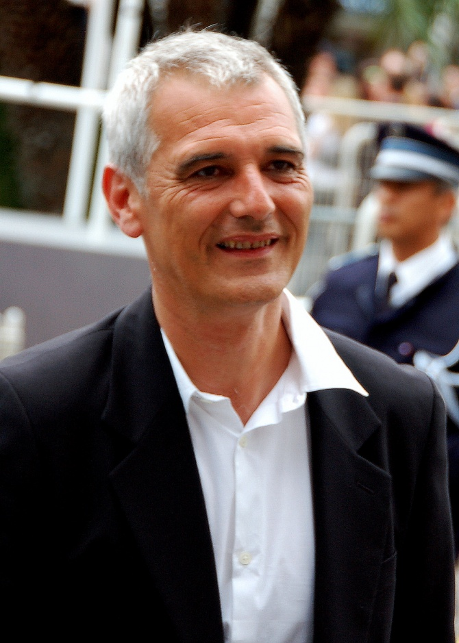 Laurent Cantet au festival de Cannes